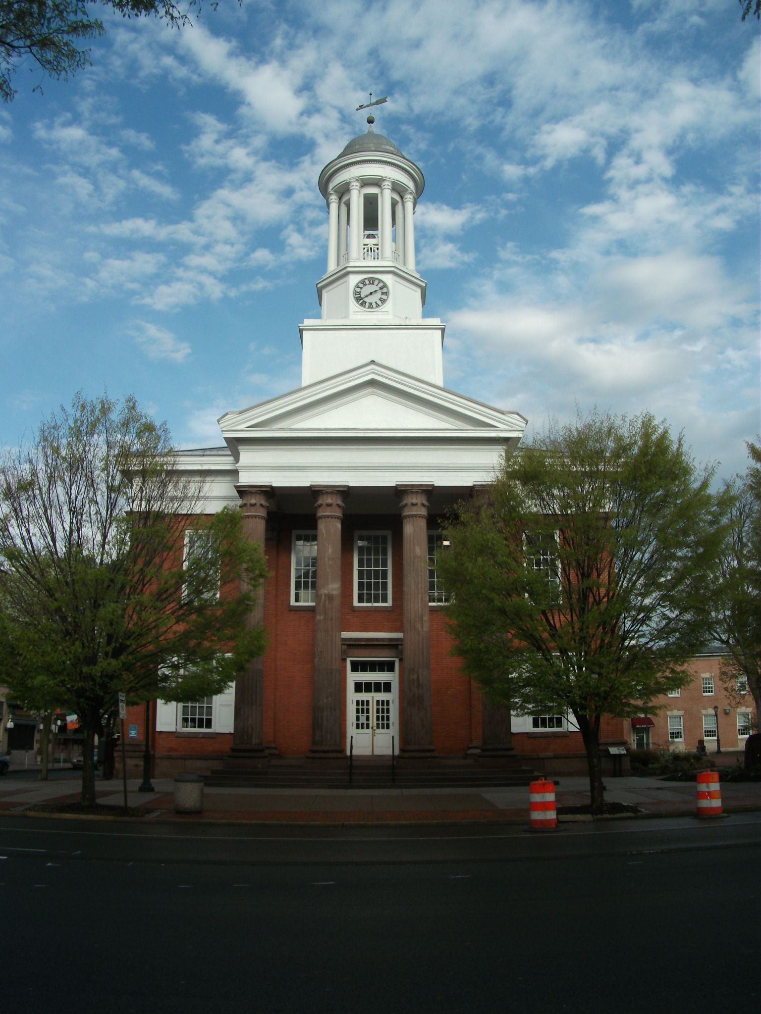 Carlisle, Pennsylvania